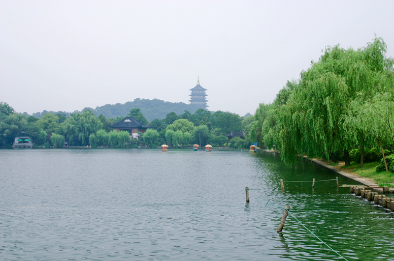 西湖美景